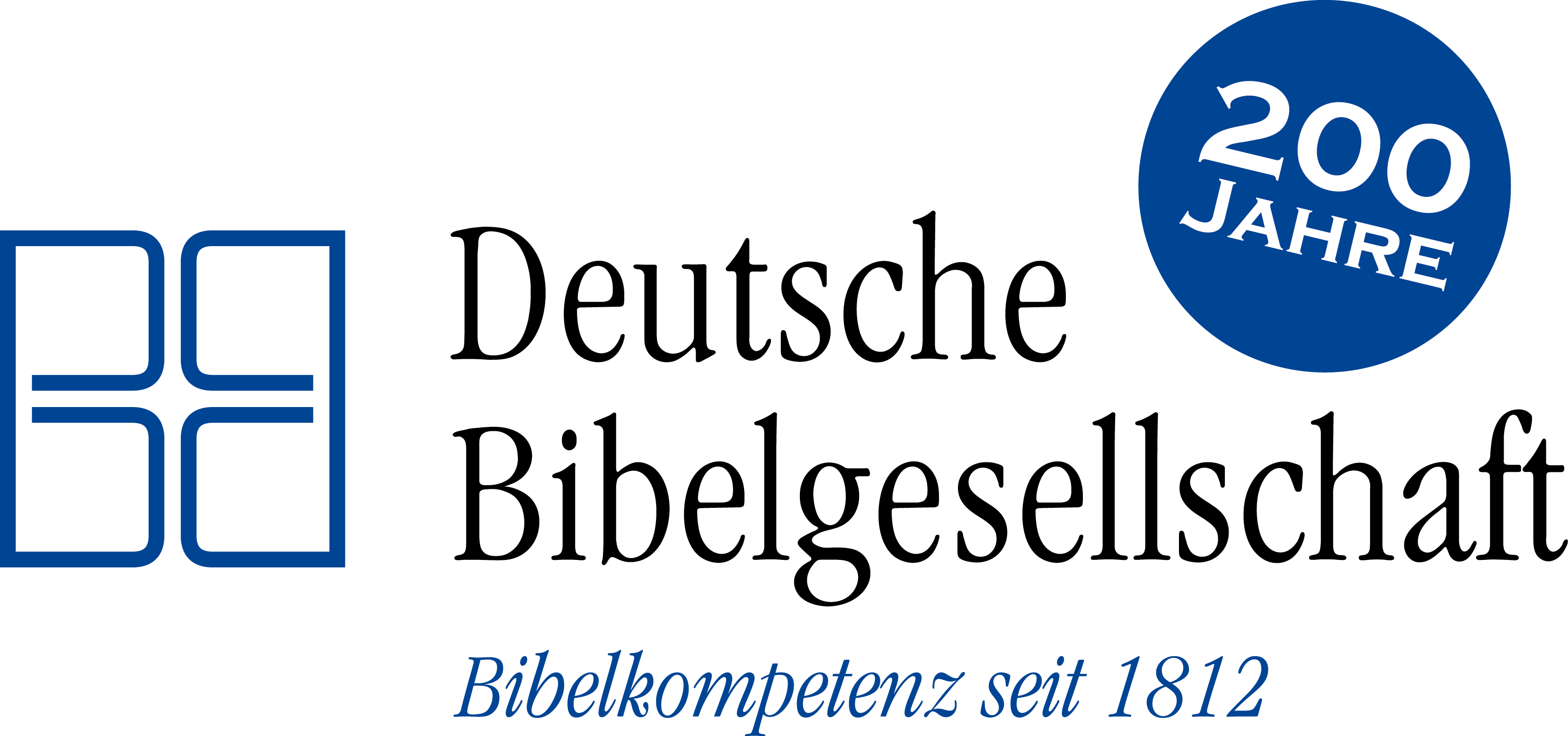 Jubiläumslogo 200 Jahre Deutsche Bibelgesellschaft